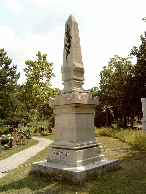 Matolay Elek (Sátoraljaújhely, 1836. jún. 23. – Budapest, 1883. ápr. 9.): ügyvéd, a torna, az iskolai testnevelés úttörőjének sírja Budapesten. Kerepesi temető: 43-18-1.